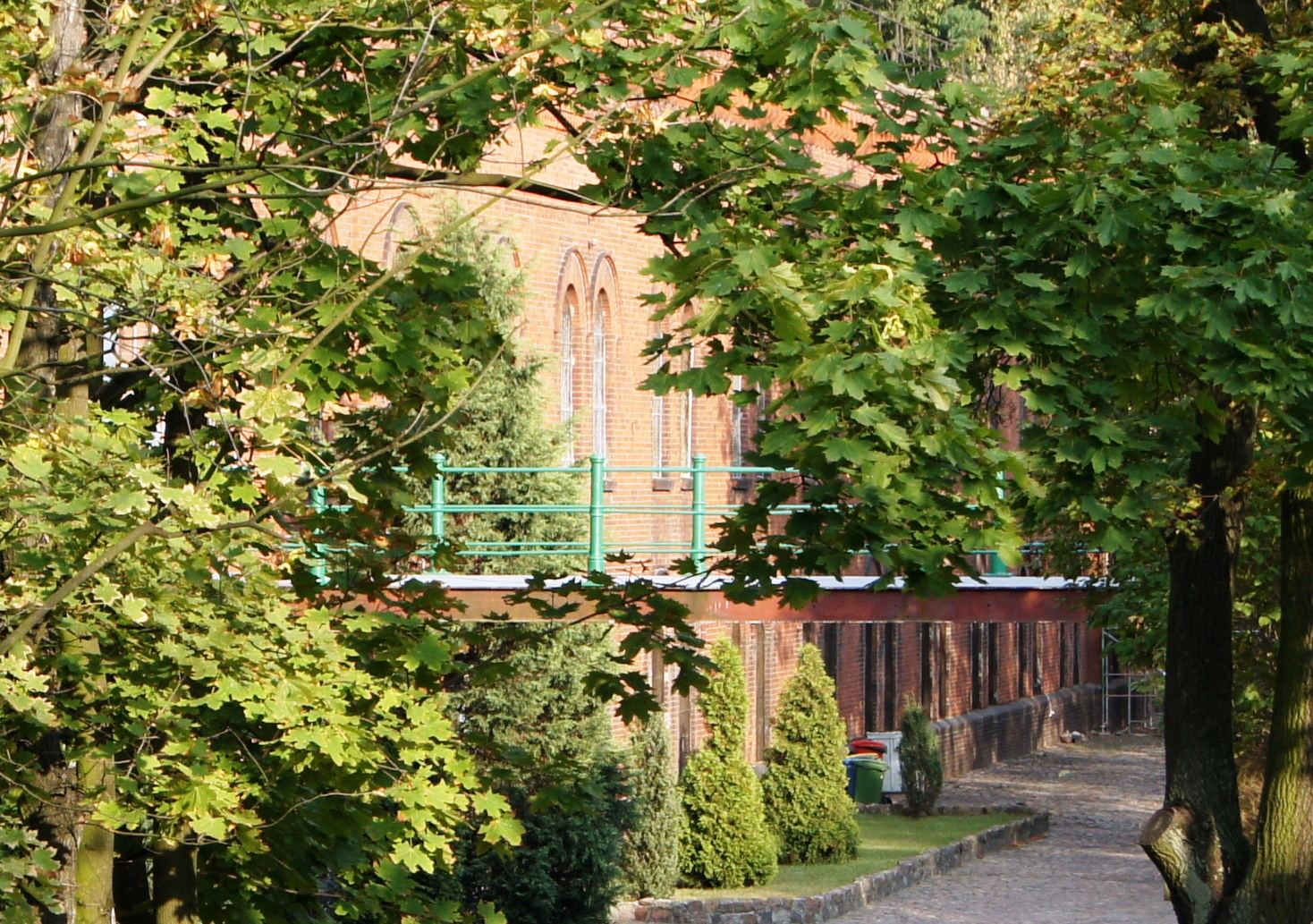 Toruń, ul. Chłopickiego 1-7 - koszary „Bramy Lubickiej”, 1880-93: schron koszarowy: budynek pomocniczy z kładką (zabytek nr rejestr. A/95/1-5)